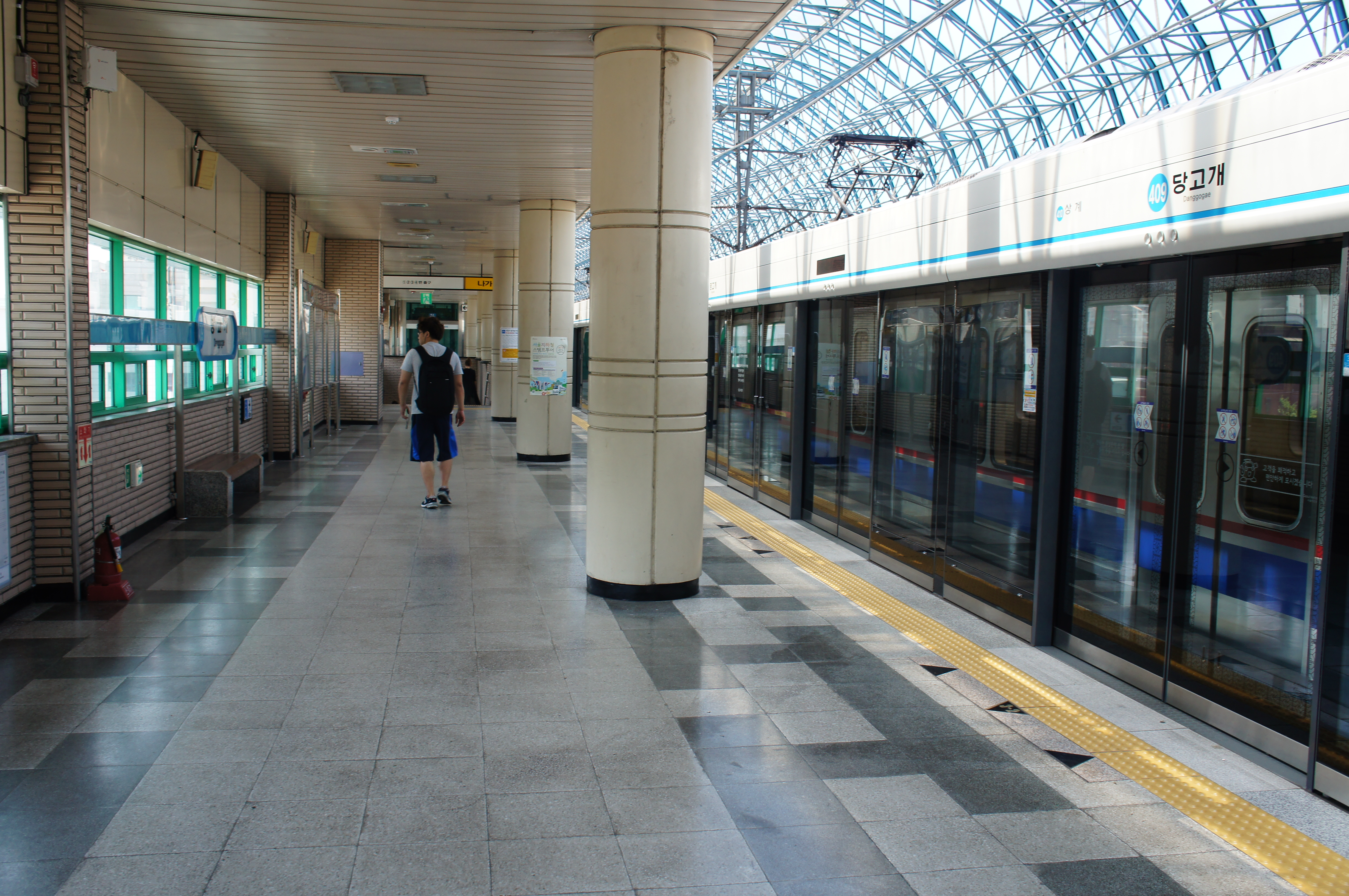 당고개역 승강장